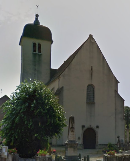 Eglise Saint Jean-Baptiste